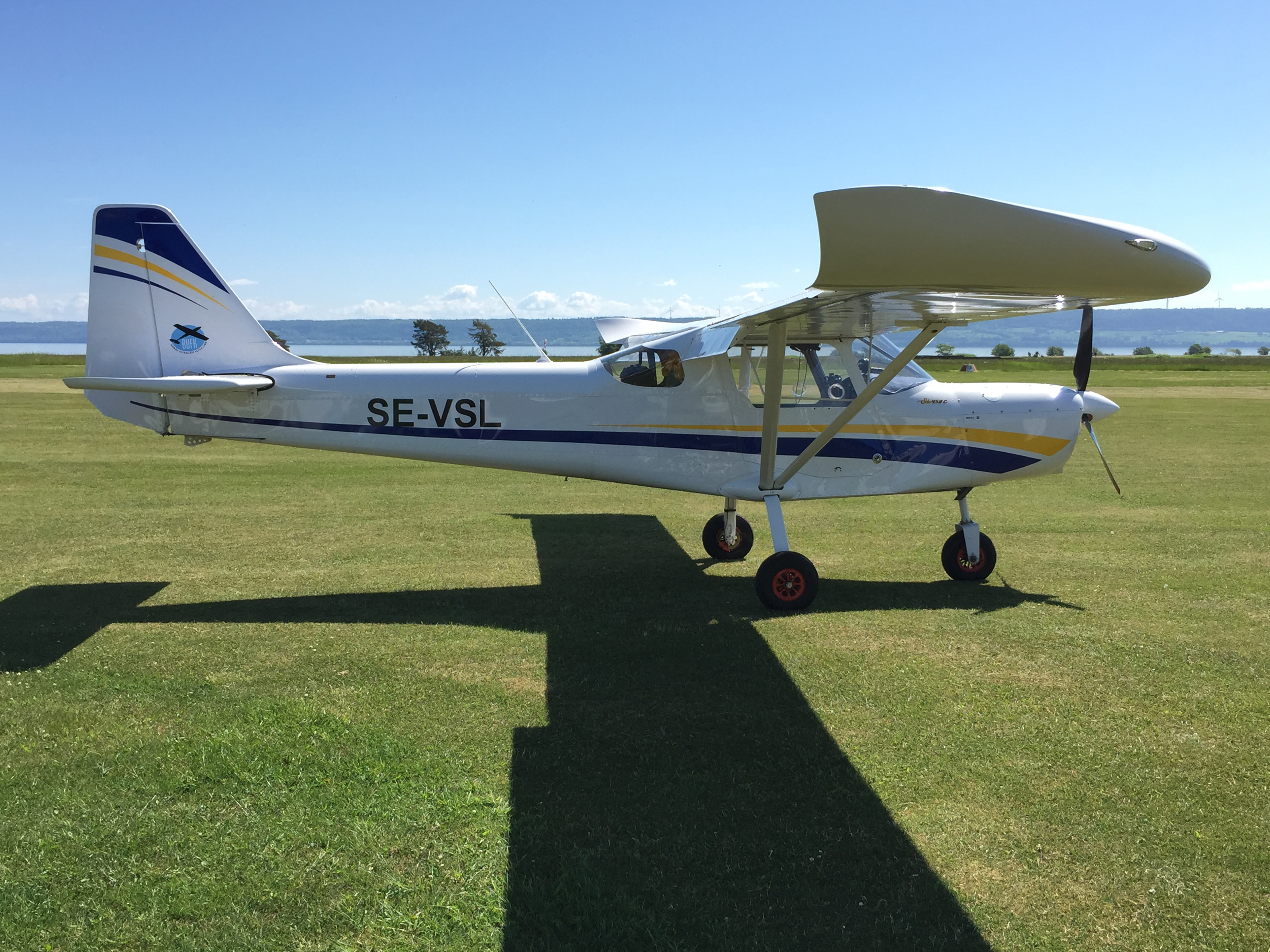 Ett modernt ultralätt flygplan (SILA 450C) tillhörande Borås Ultralätt Flygklubb, parkerad på flygfältet på Visingsö